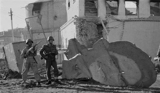 إنقلابيوا الجيش العراقي يقومون بأسقاط صورة عبد الكريم قاسم في إنقلاب 8 شباط 1963 أمام وزارة الدفاع العراقية